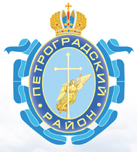 Герб Петроградского района Санкт-Петербурга